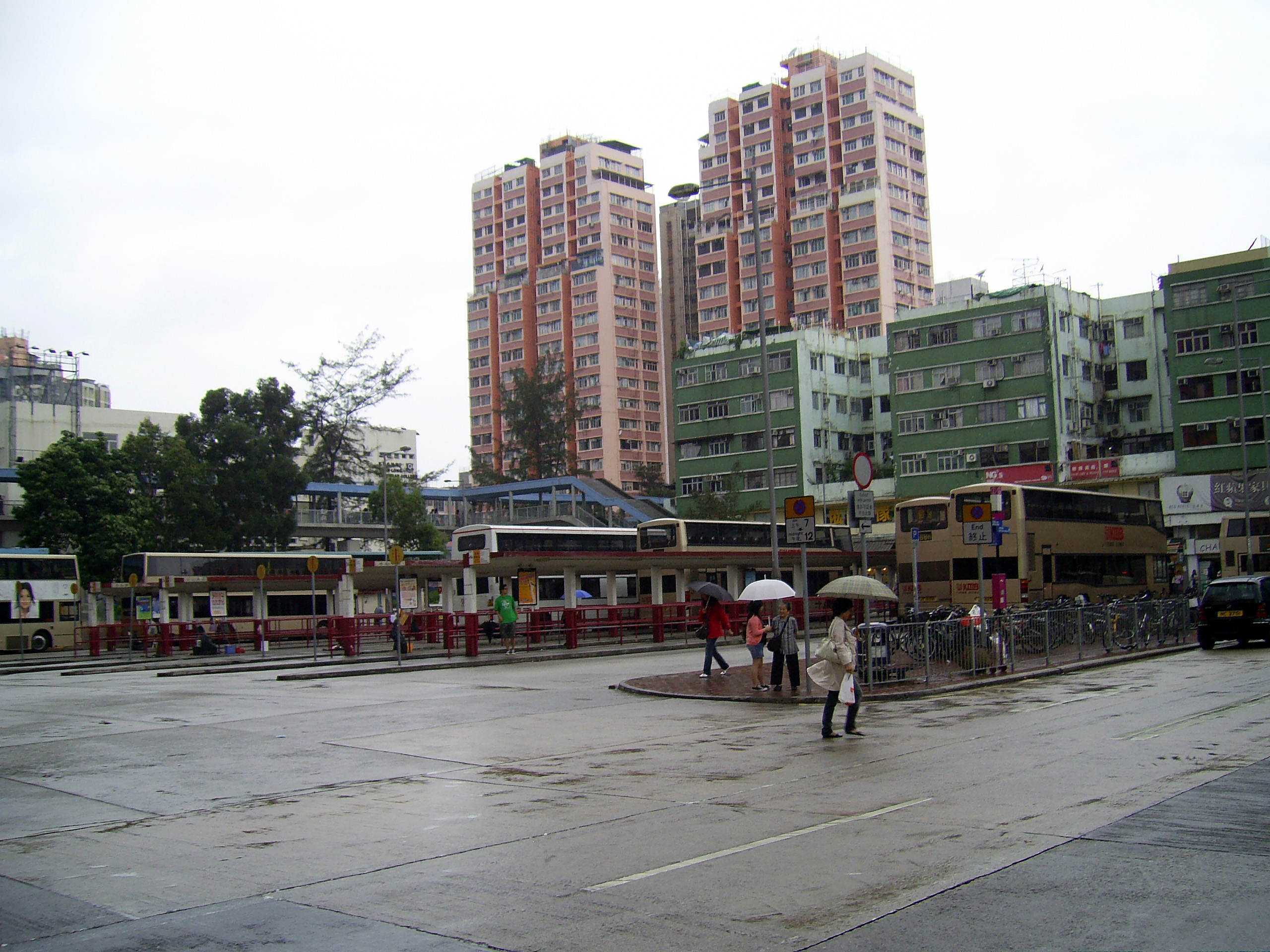 中文（香港）: 元朗（西）巴士總站